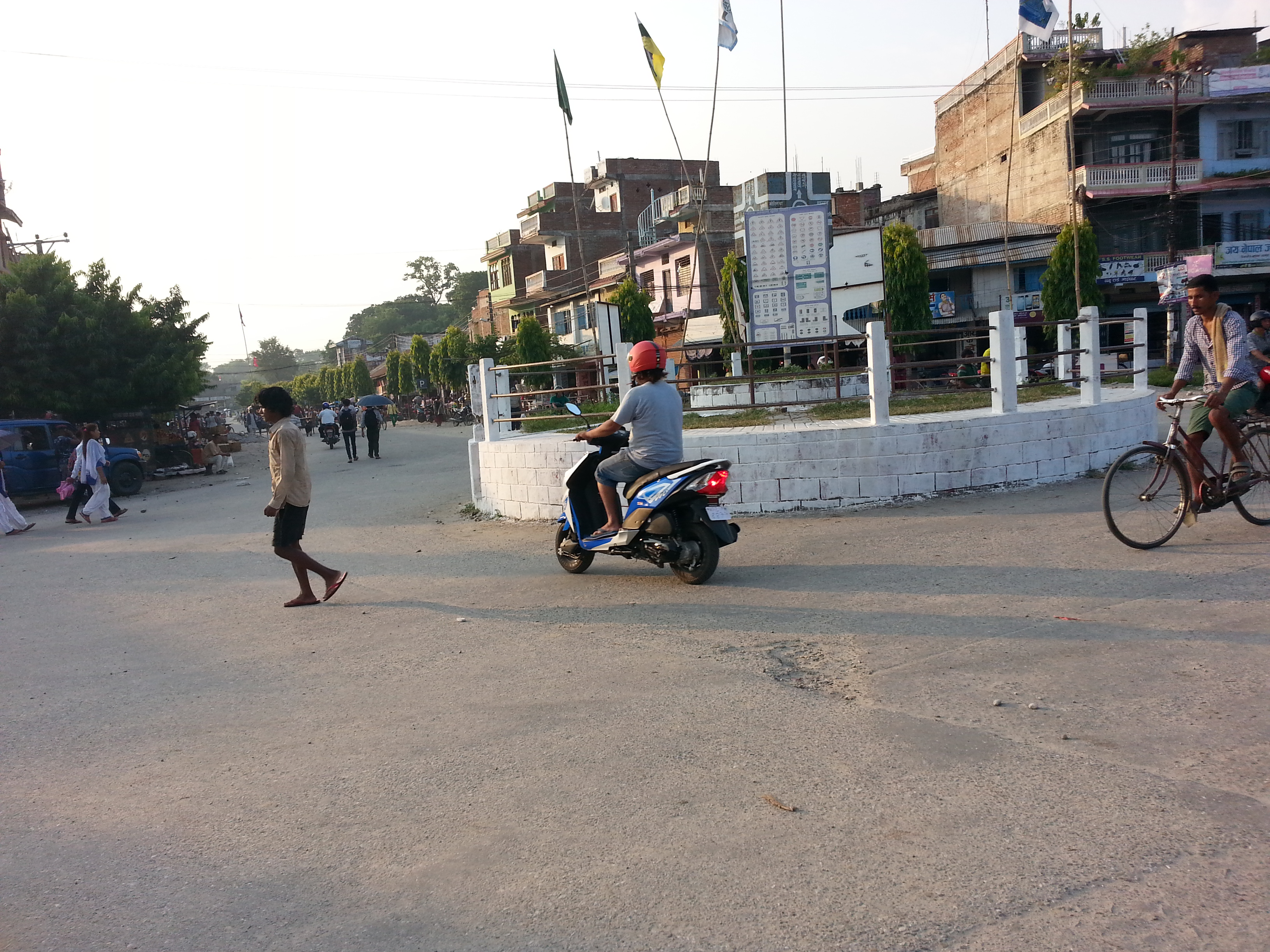 नेपाली: मुख्य चोक, गाईघाट बजार